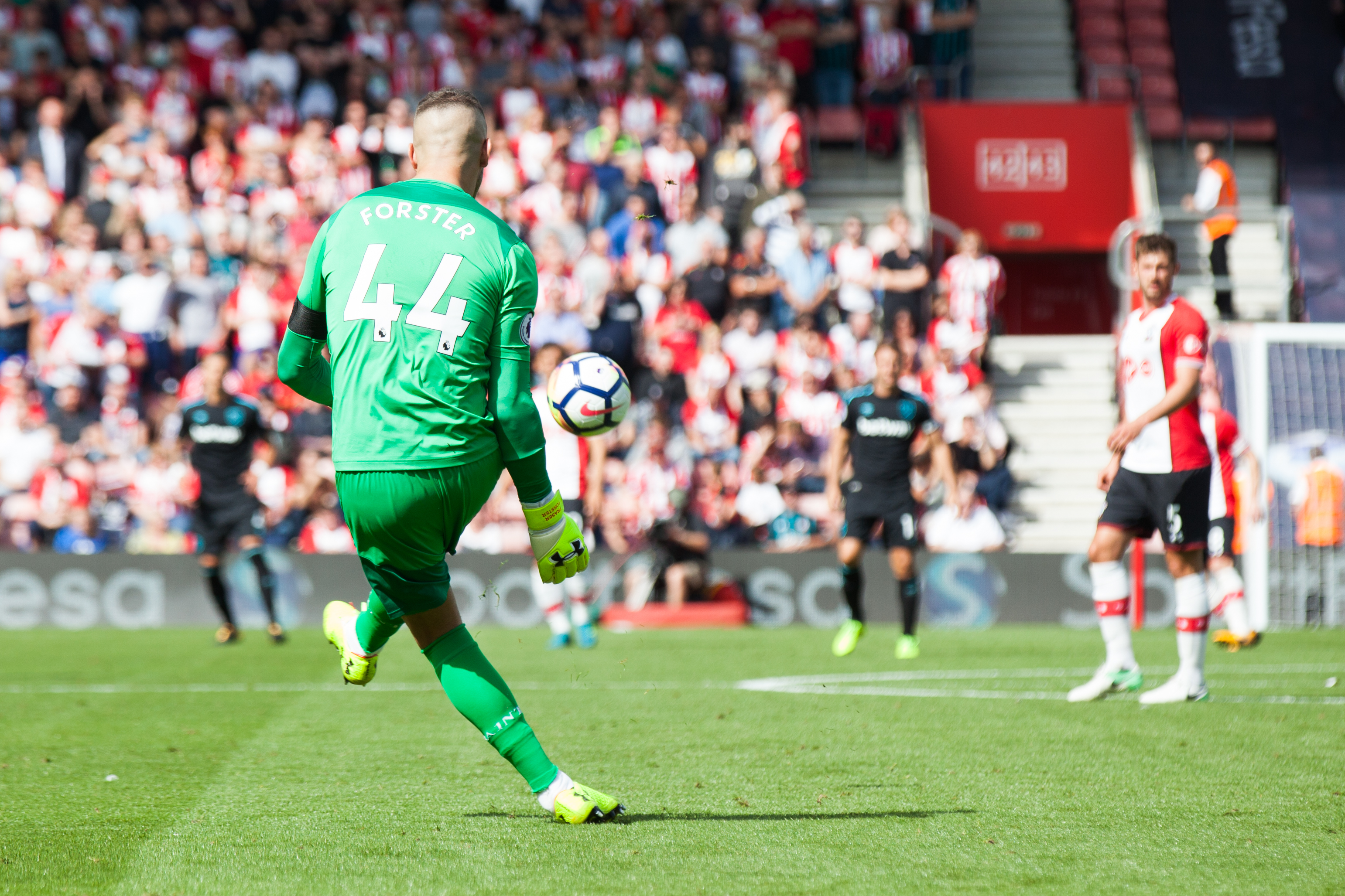 Forster kicking the ball